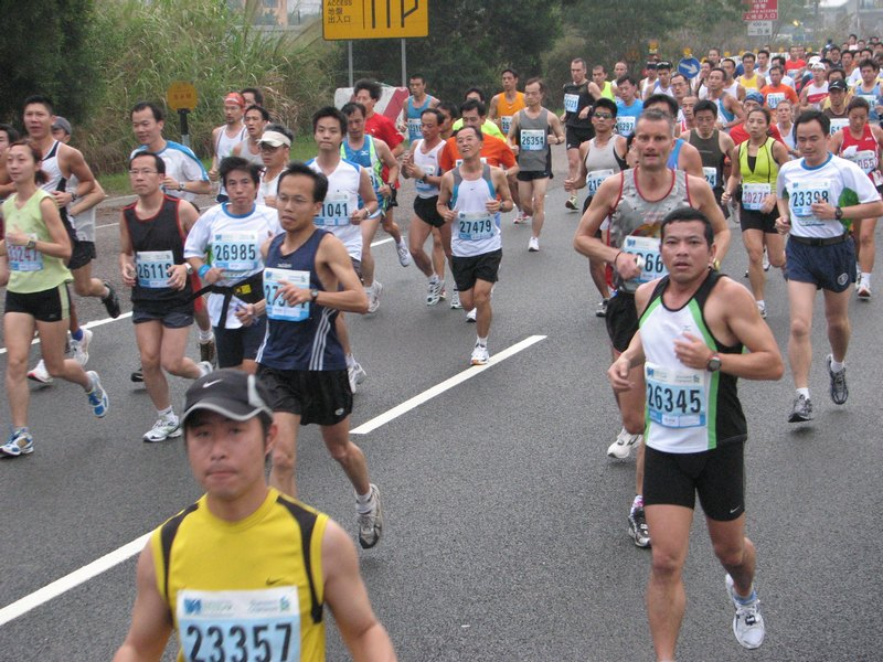 Hong Kong marathon 2007